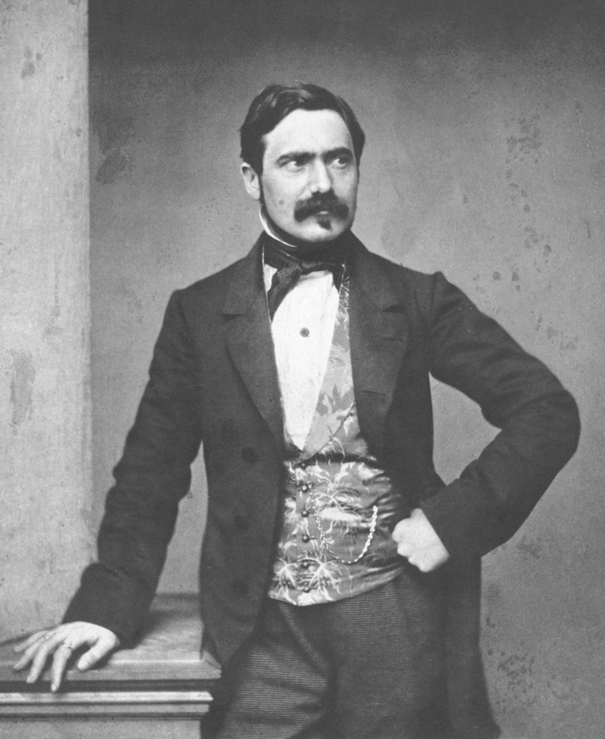 Max Joseph von Pettenkofer (1818-1901), German chemist